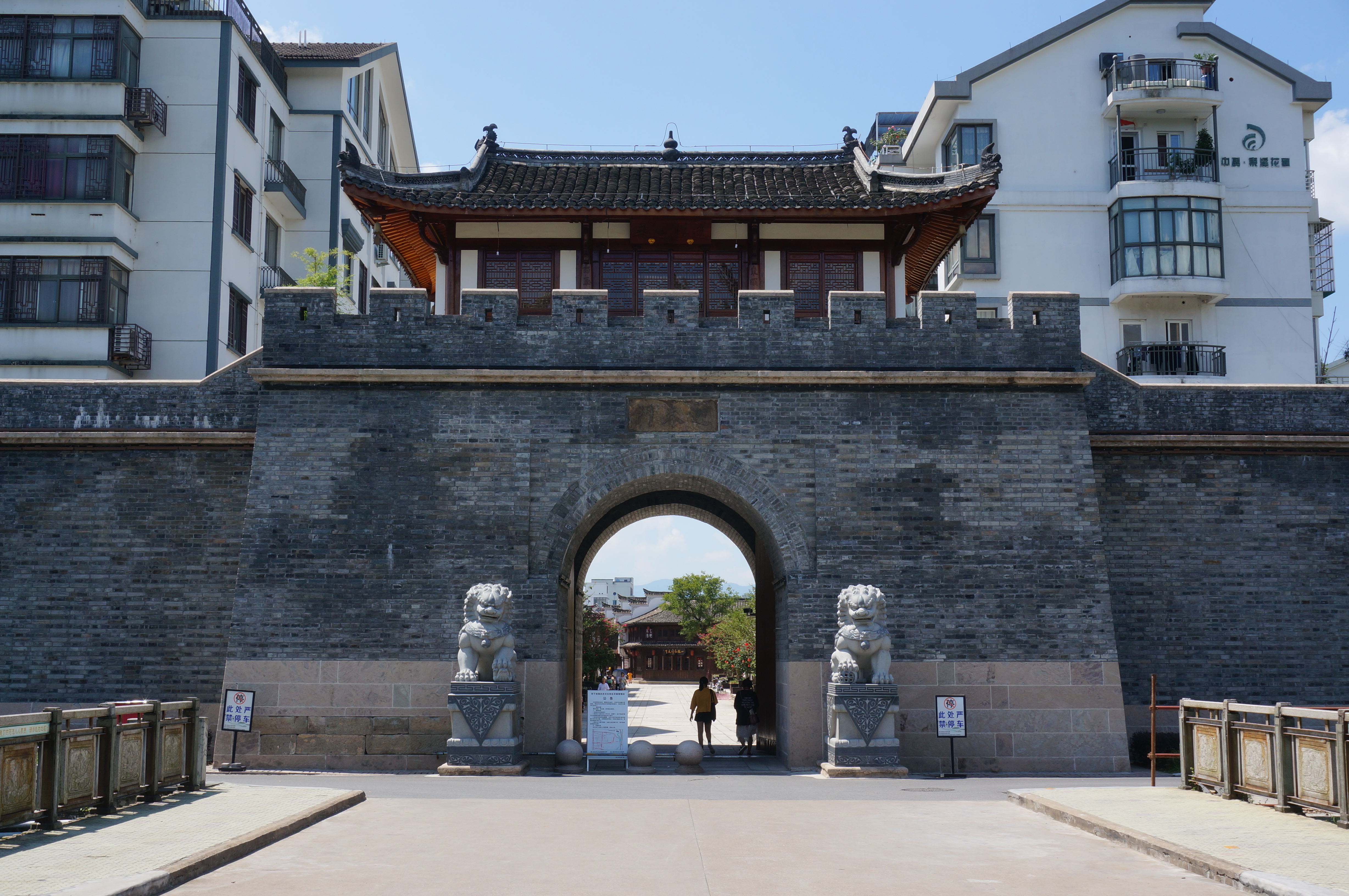 浦江迎春门，外侧（东面）。